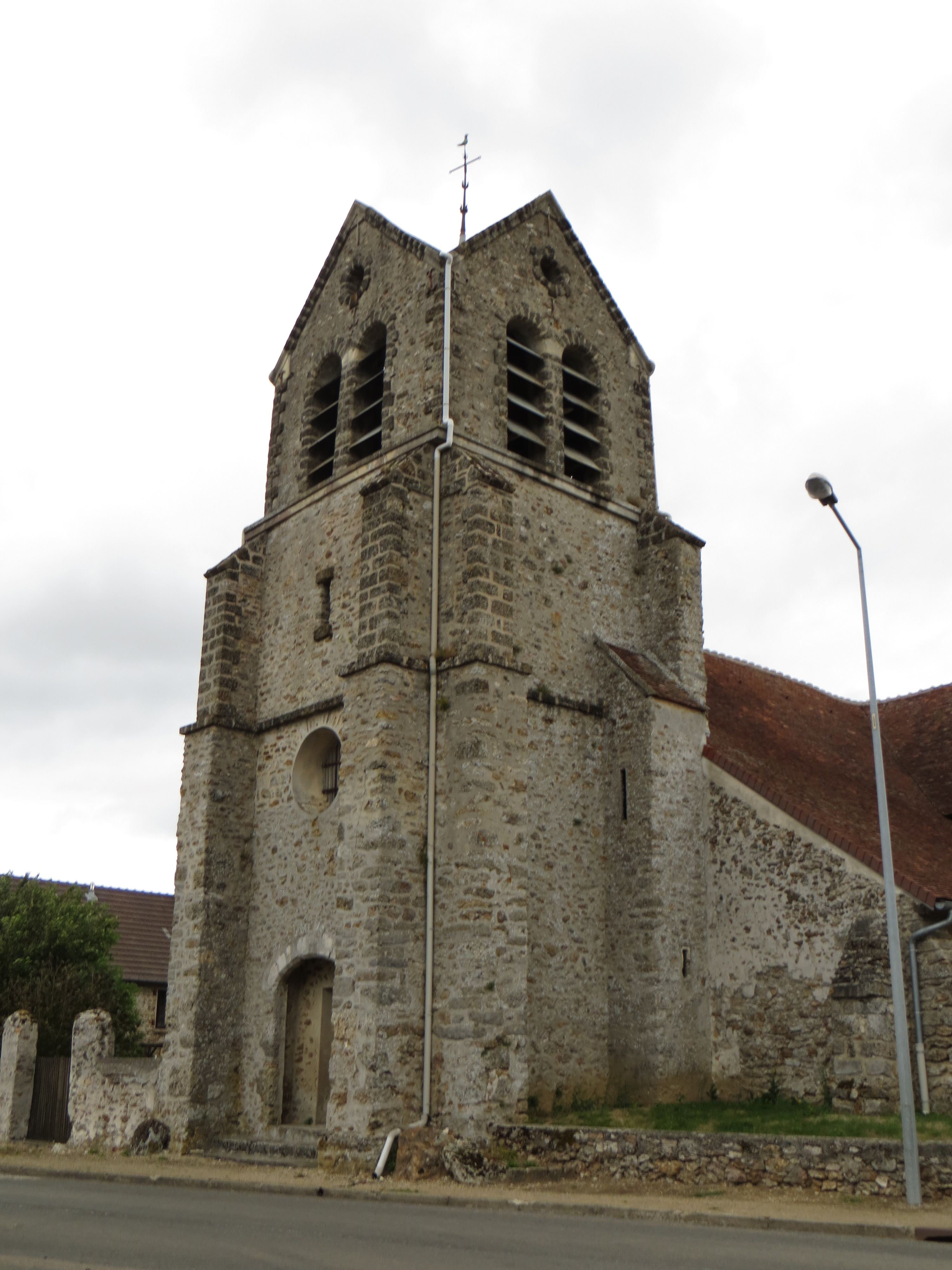 Vue de l'église